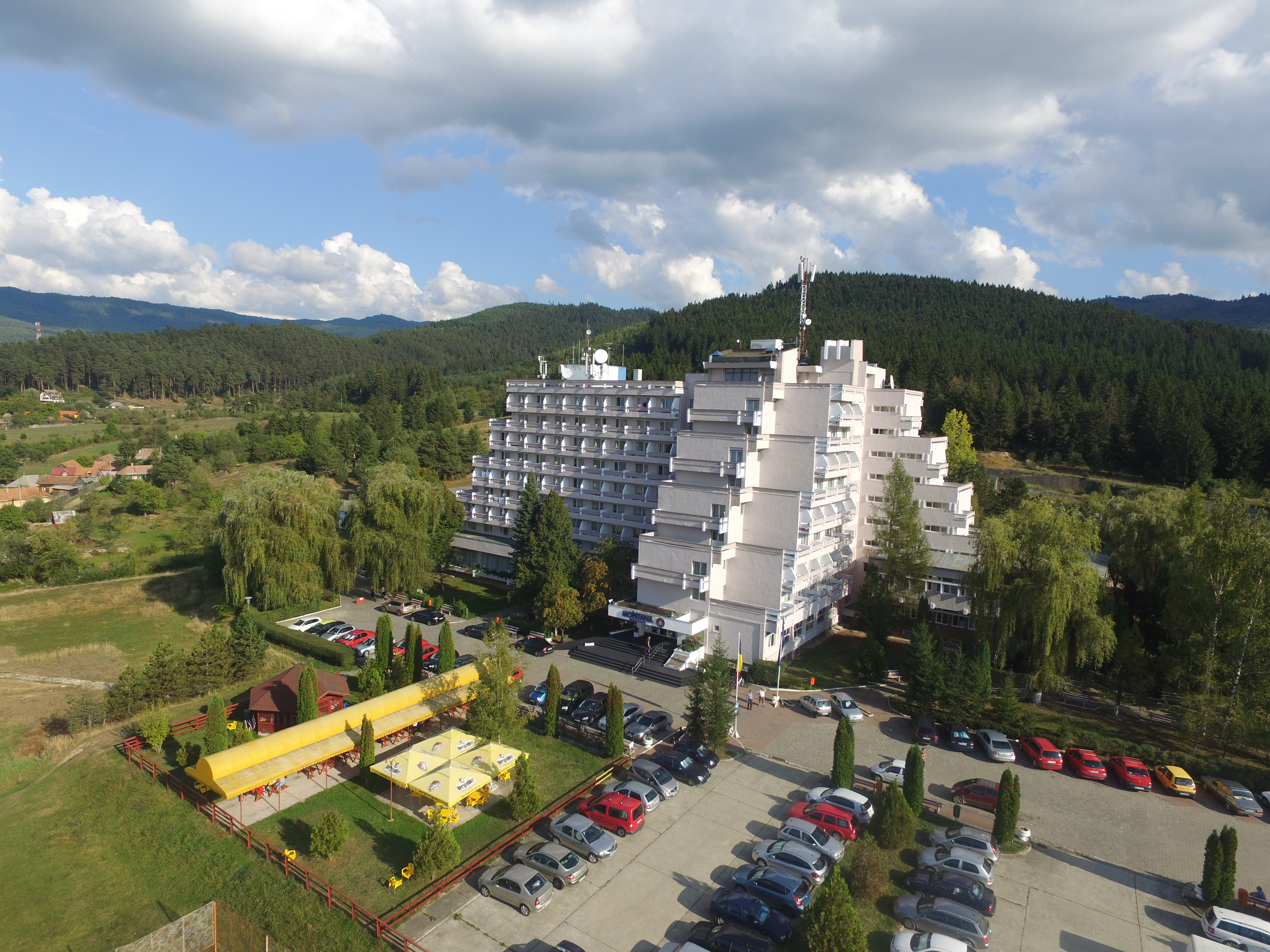 Hotel cu bază de tratament, aflat pe o colină, lângă pădure cu brazi.